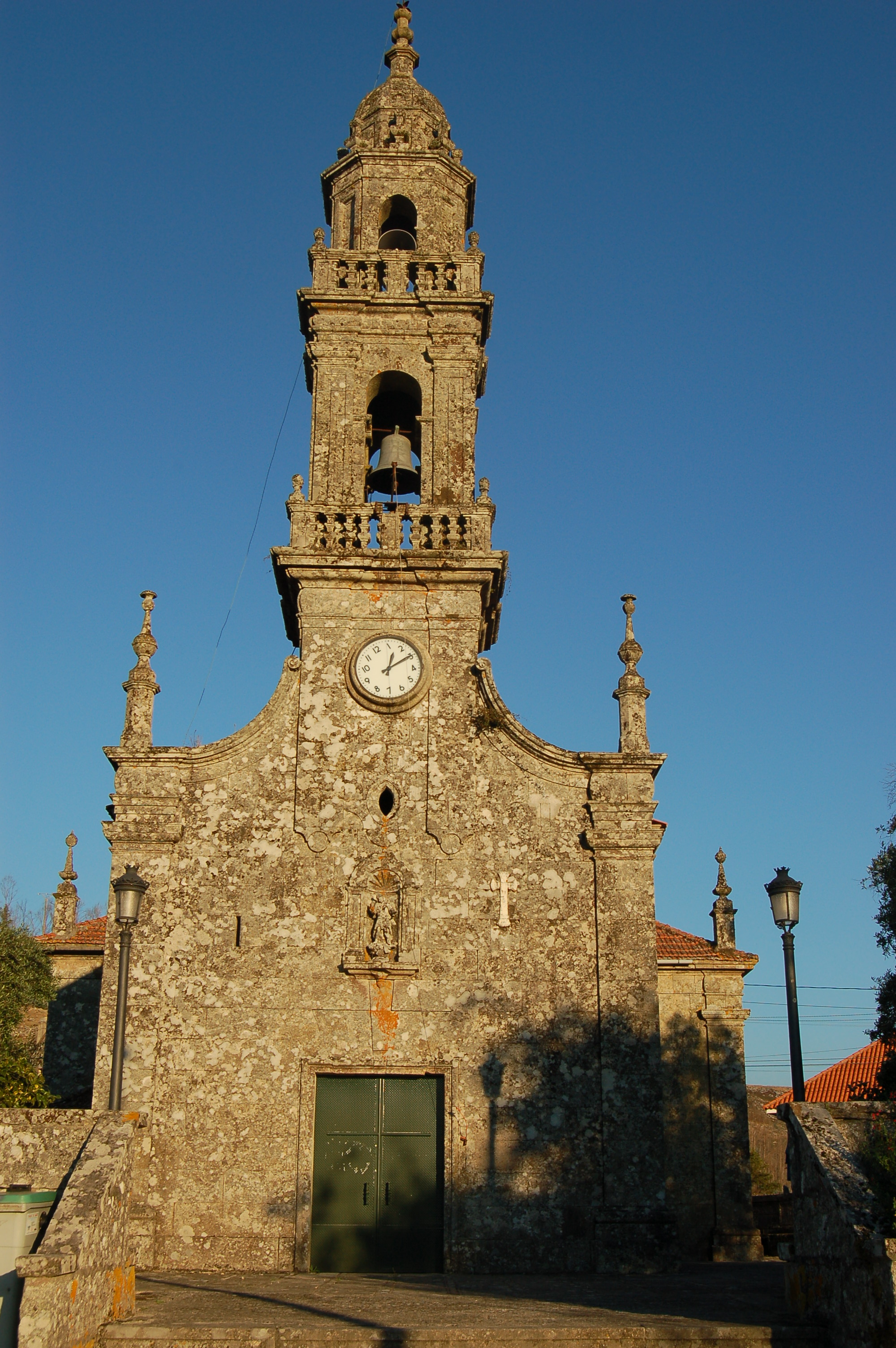 Igrexa parroquial de San Miguel de Carballedo (Cerdedo-Cotobade)